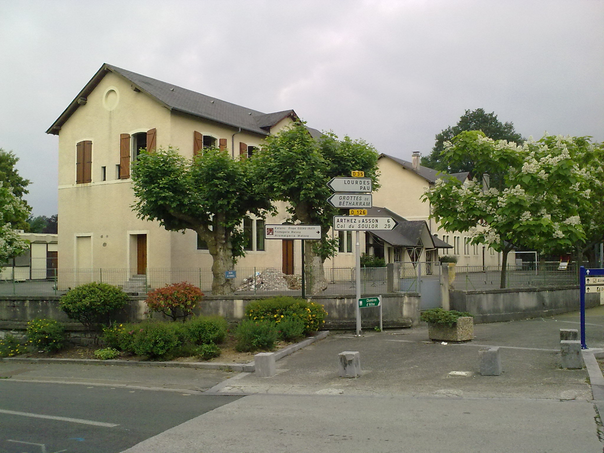 Ecole de Asson.